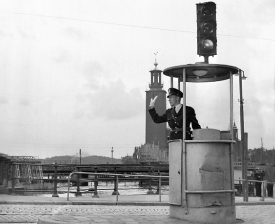 Tegelbacken mot Stadshuset. En trafikpolis i en kur